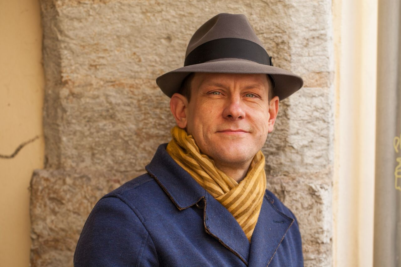 Jan Uuspõld